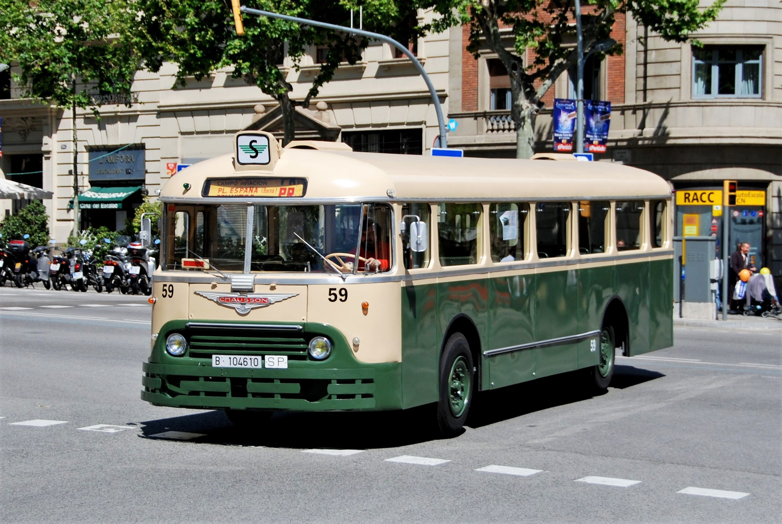 El autobús Chausson número 59 de Urbanizaciones y Transportes, preservado y restaurado en estado de marcha por la Fundació TMB, se dirige a la exposición de la tercera edición del Rally Bus de Barcelona.